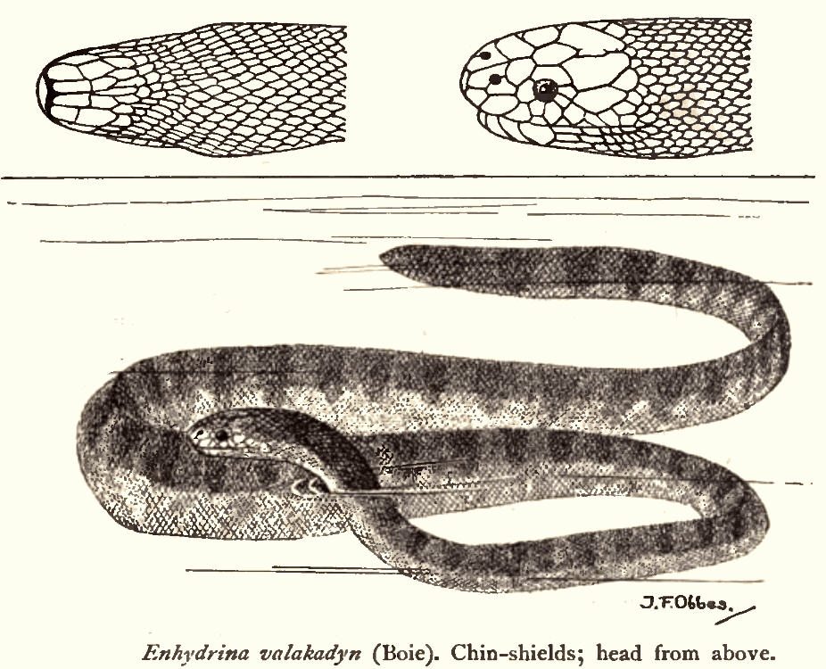 Enhydrina valakadyn , Enhydrina schistosa